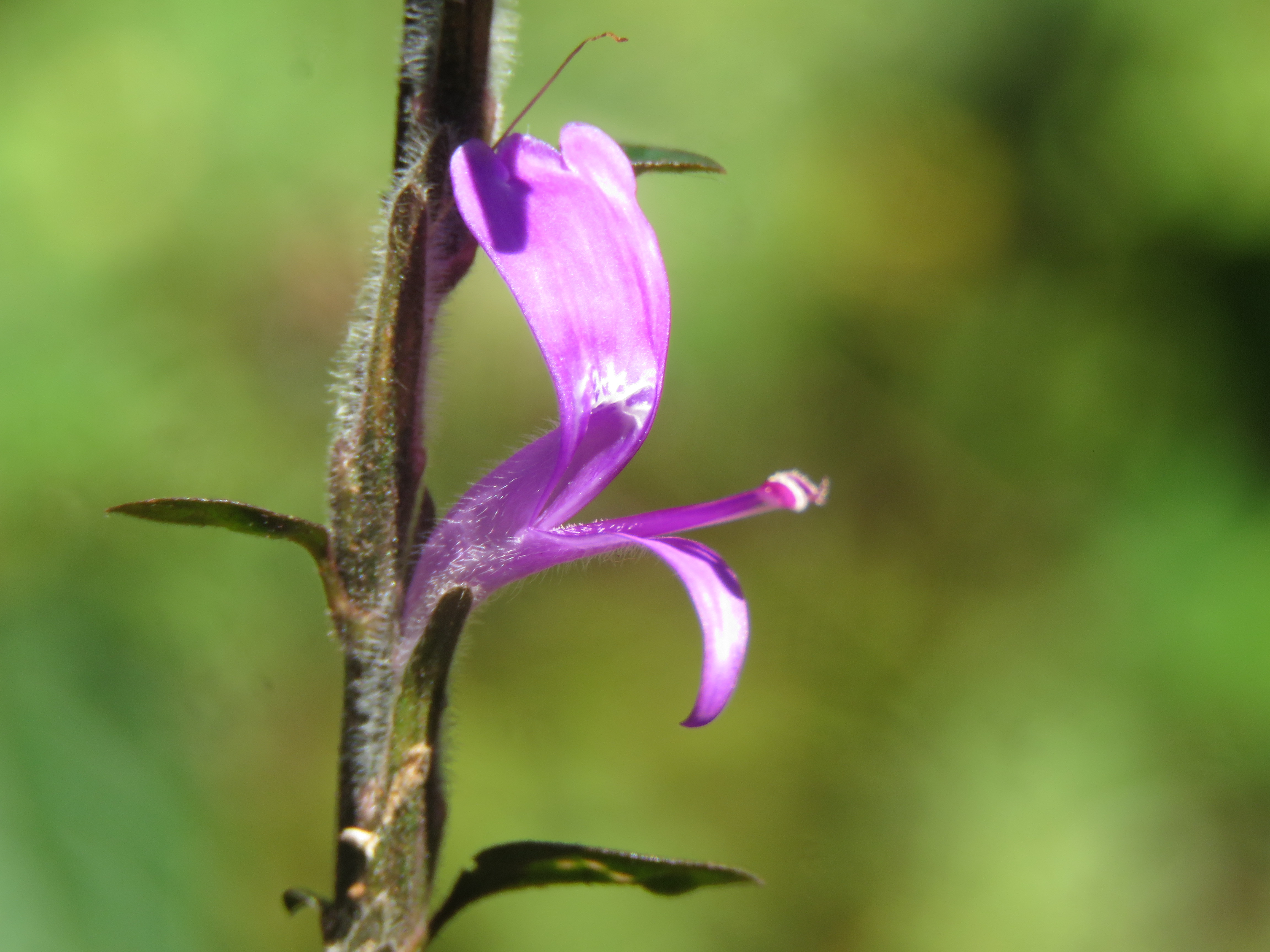 Photos from Tadiandamol, Tadiyantamol during GRV2019